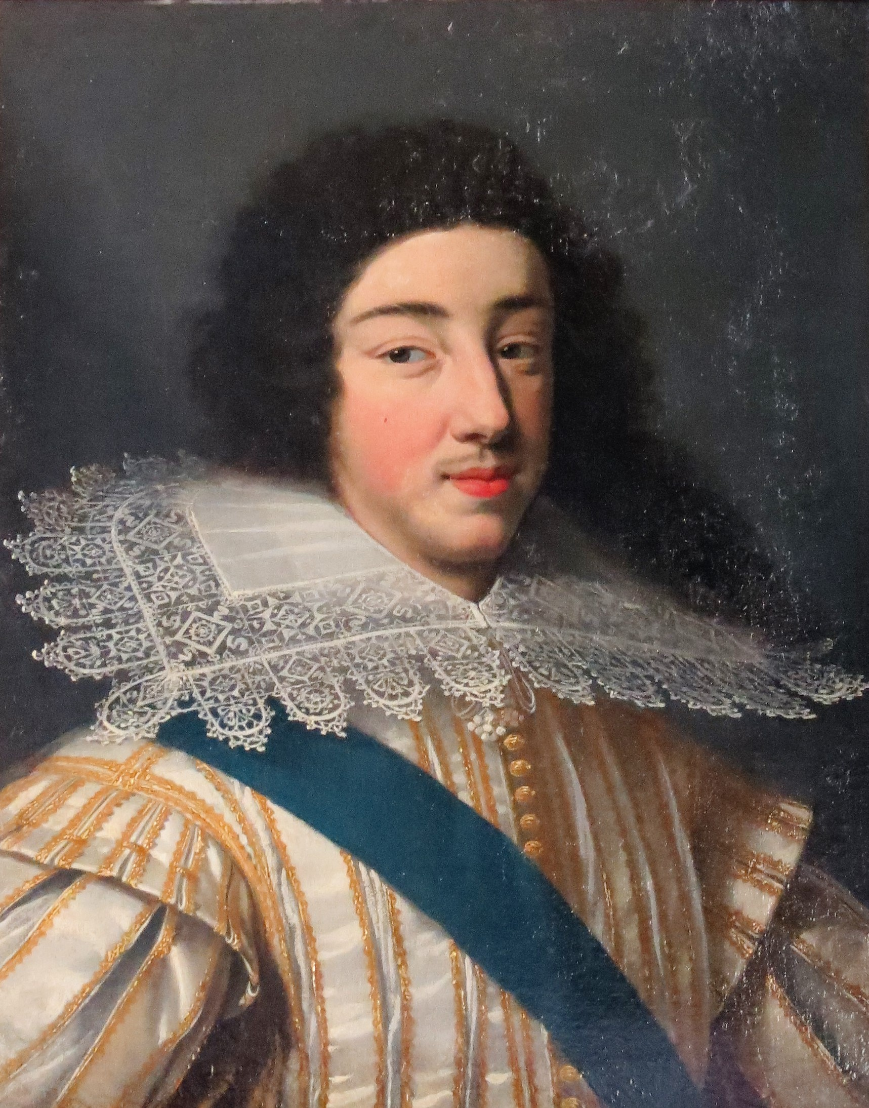 Tableau représentant Gaston d'Orléans (1608-1660), huile sur toile vers 1630 par un anonyme.